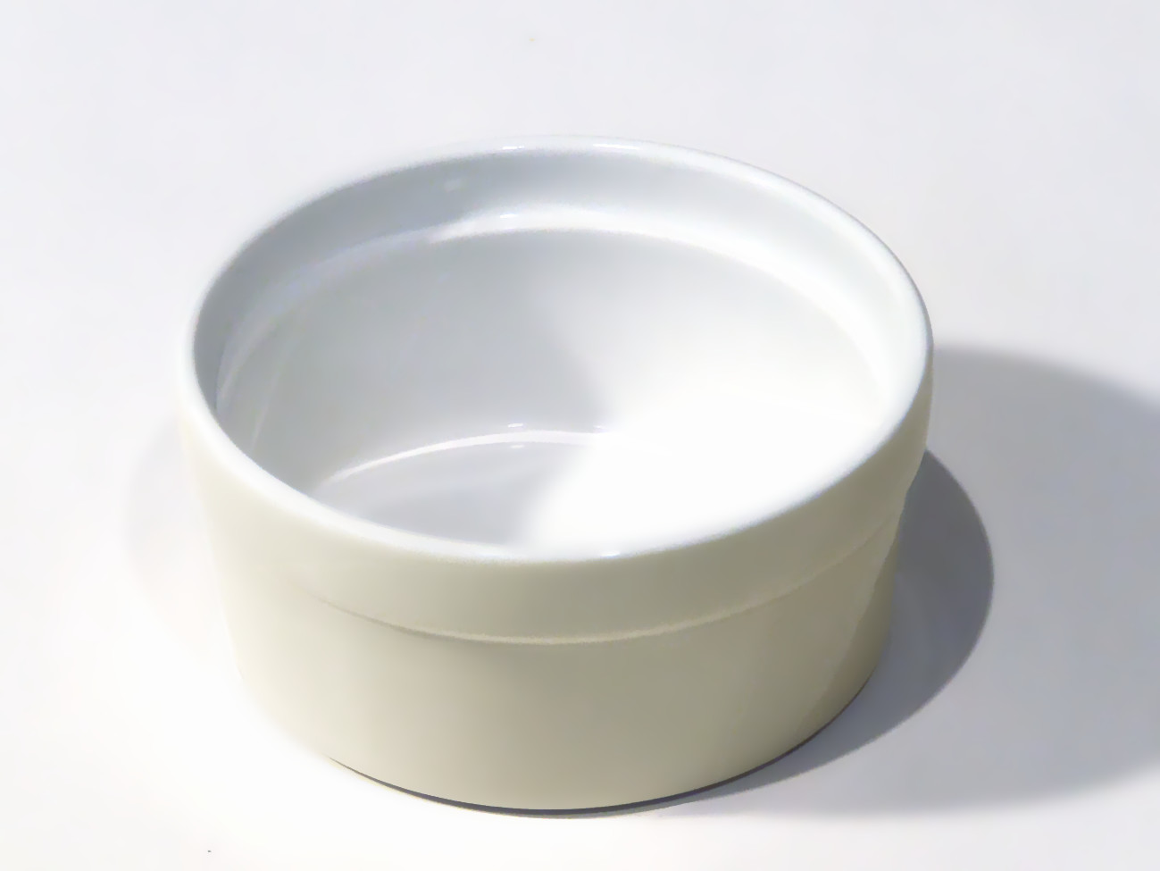 A small ramekin